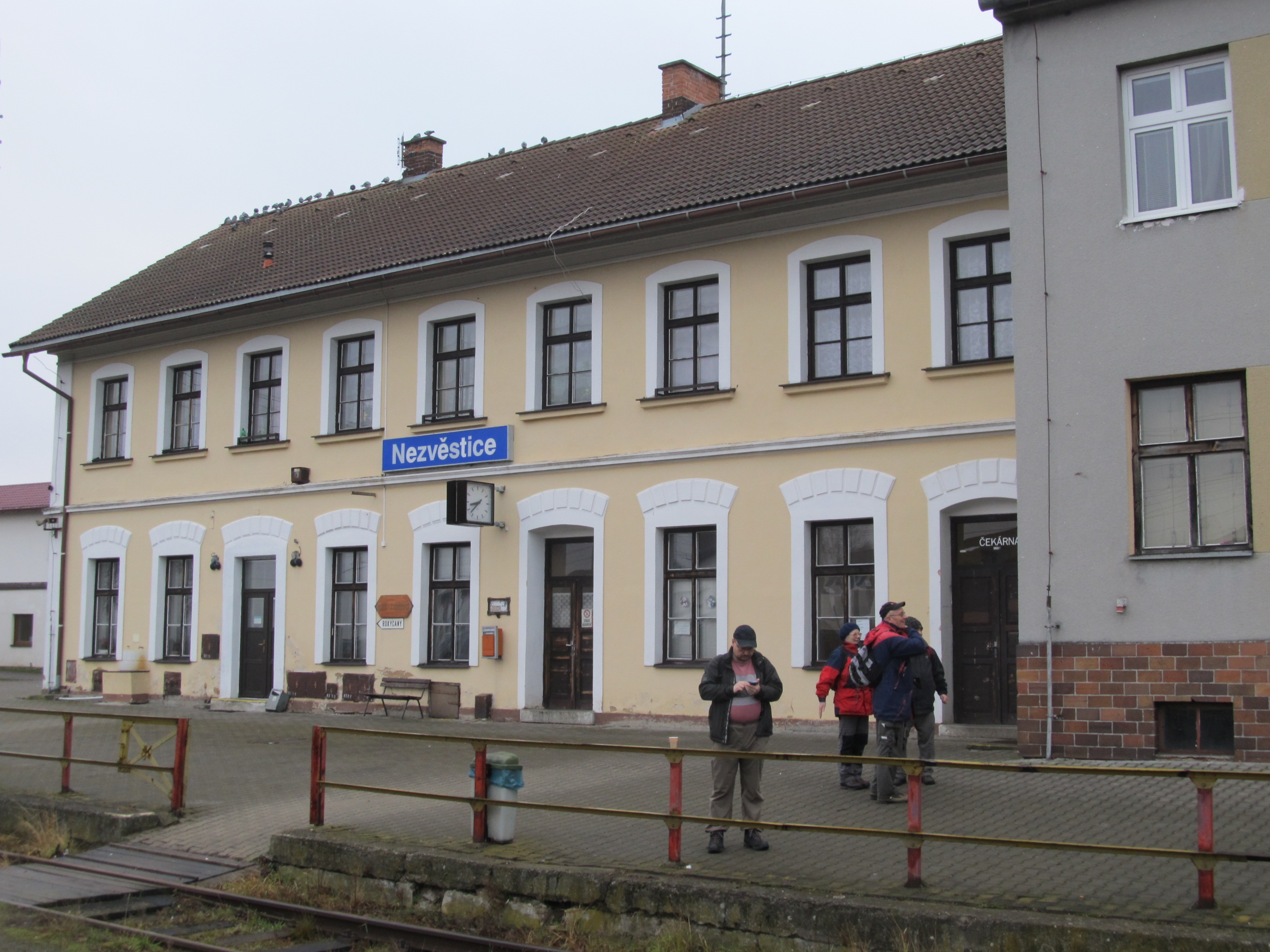 Nezvěstice - nádraží